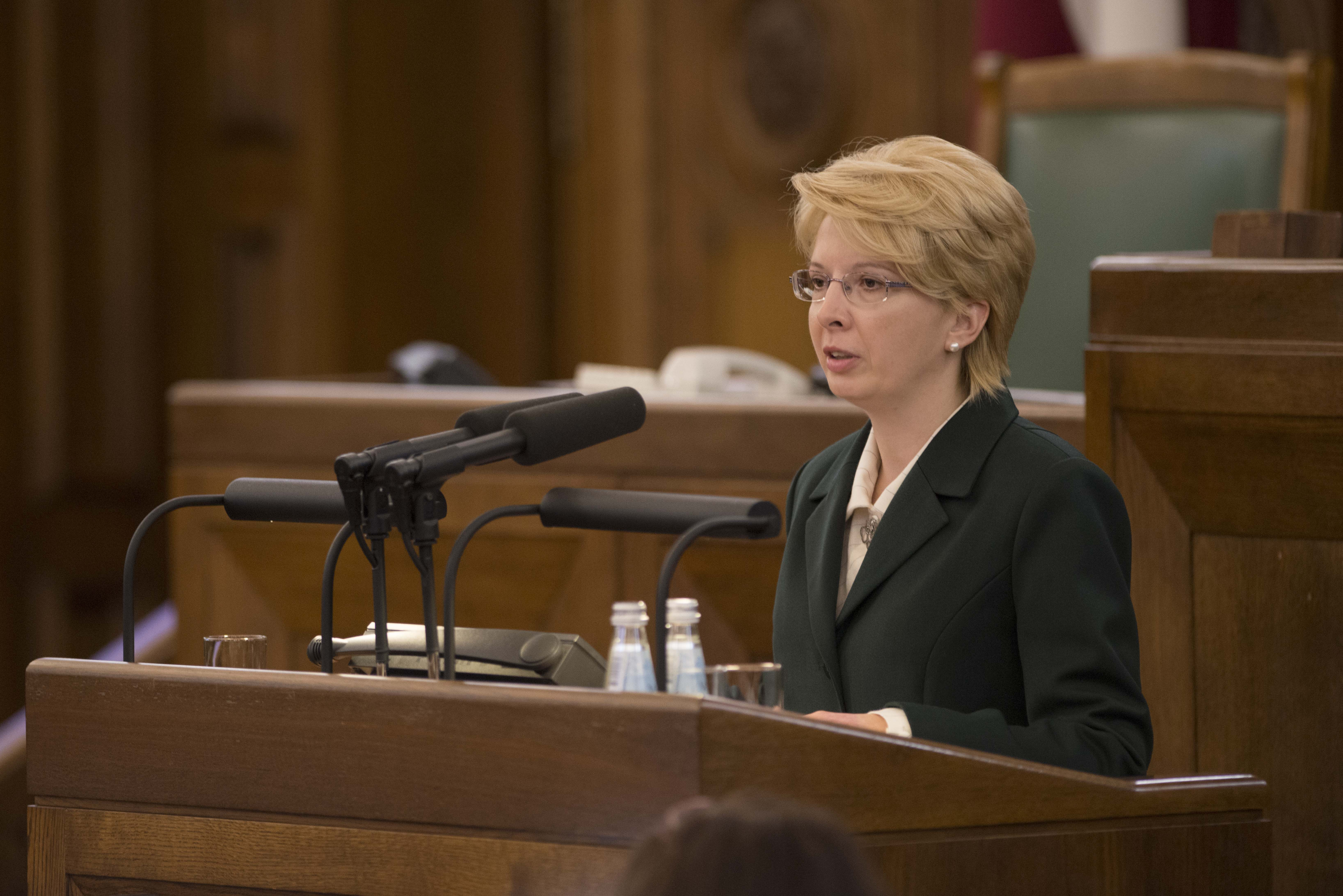 2014.gada 4.novembris. Deputāte Ināra Mūrniece dod svinīgo solījumu. Foto: Juris Vīgulis, Saeimas Kanceleja Izmantošanas noteikumi: saeima.lv/lv/autortiesibas